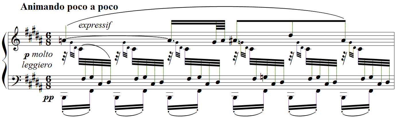 Debussy - Etude "pour les agréments", mes.33